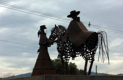 Retrato del Amor entre Manuel Rodríguez y Francisca Segura en Pumanque